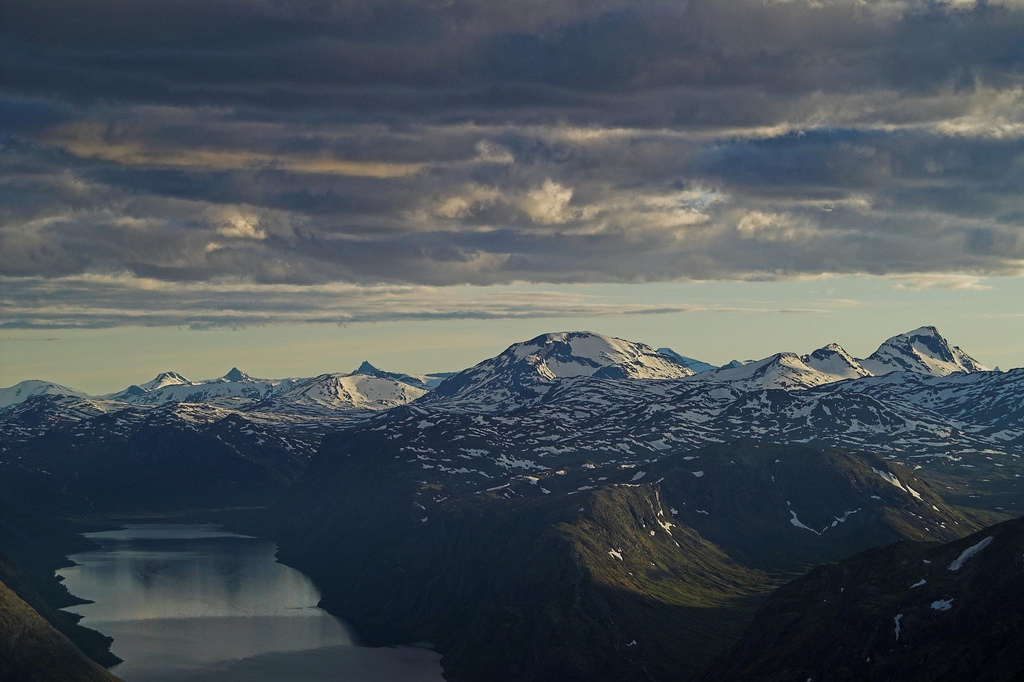 Gjende